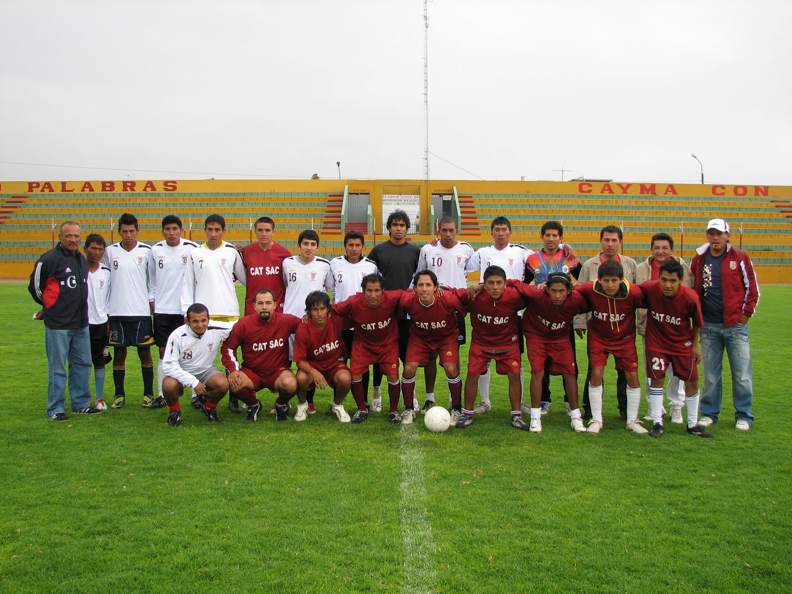 Día de entrenamiento